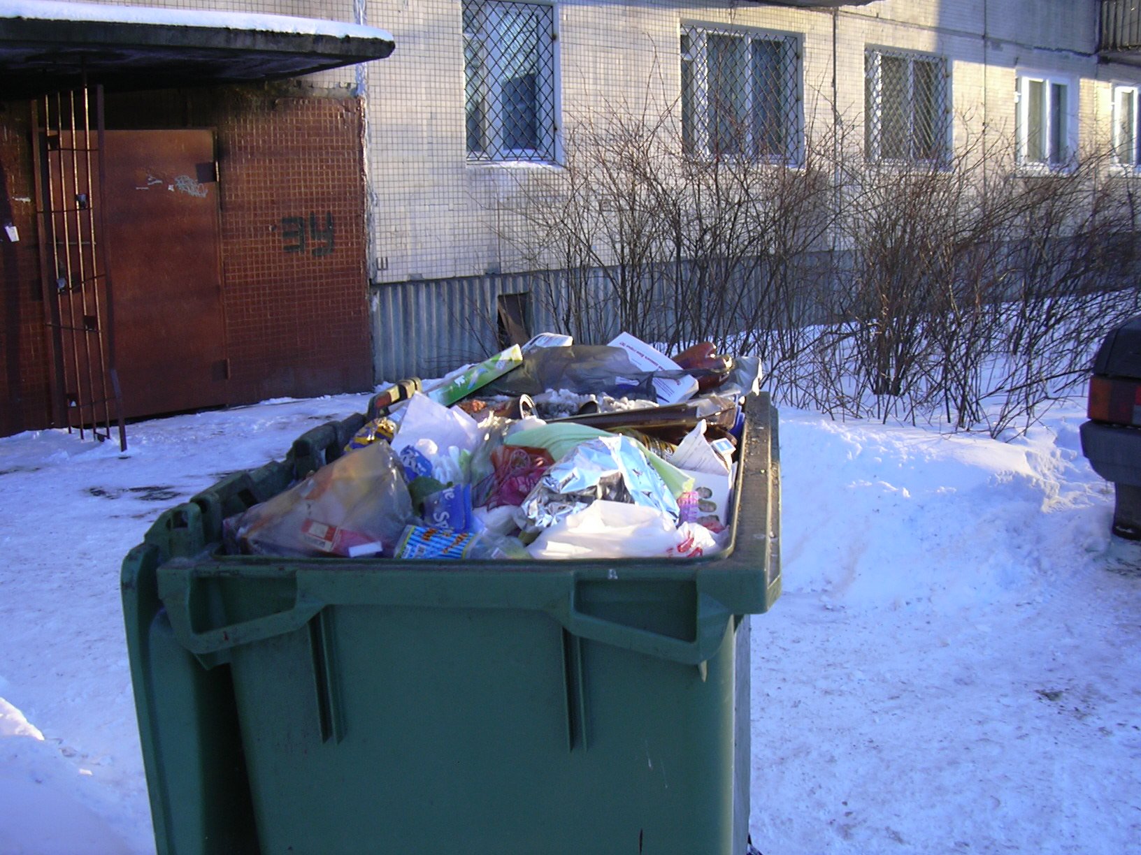 мусорная урна